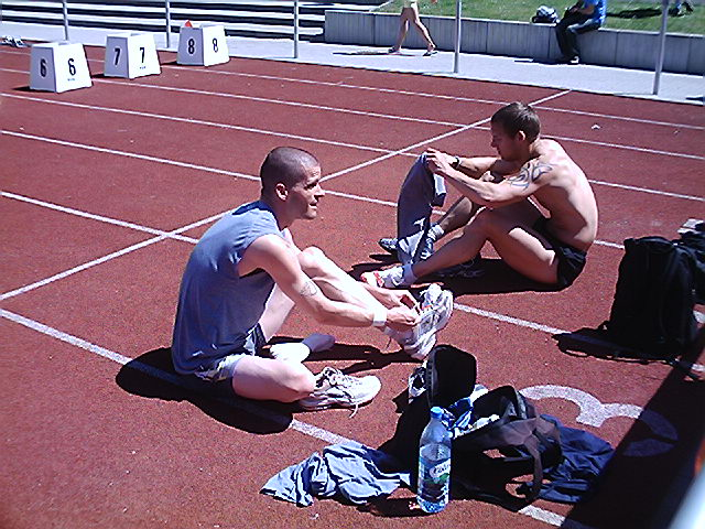 Falk Balzer (l.) und Thomas Blaschek (r.) nach dem Rennen über 110 Meter Hürden der Sächsischen Landesmeisterschaften 2006 in Borna